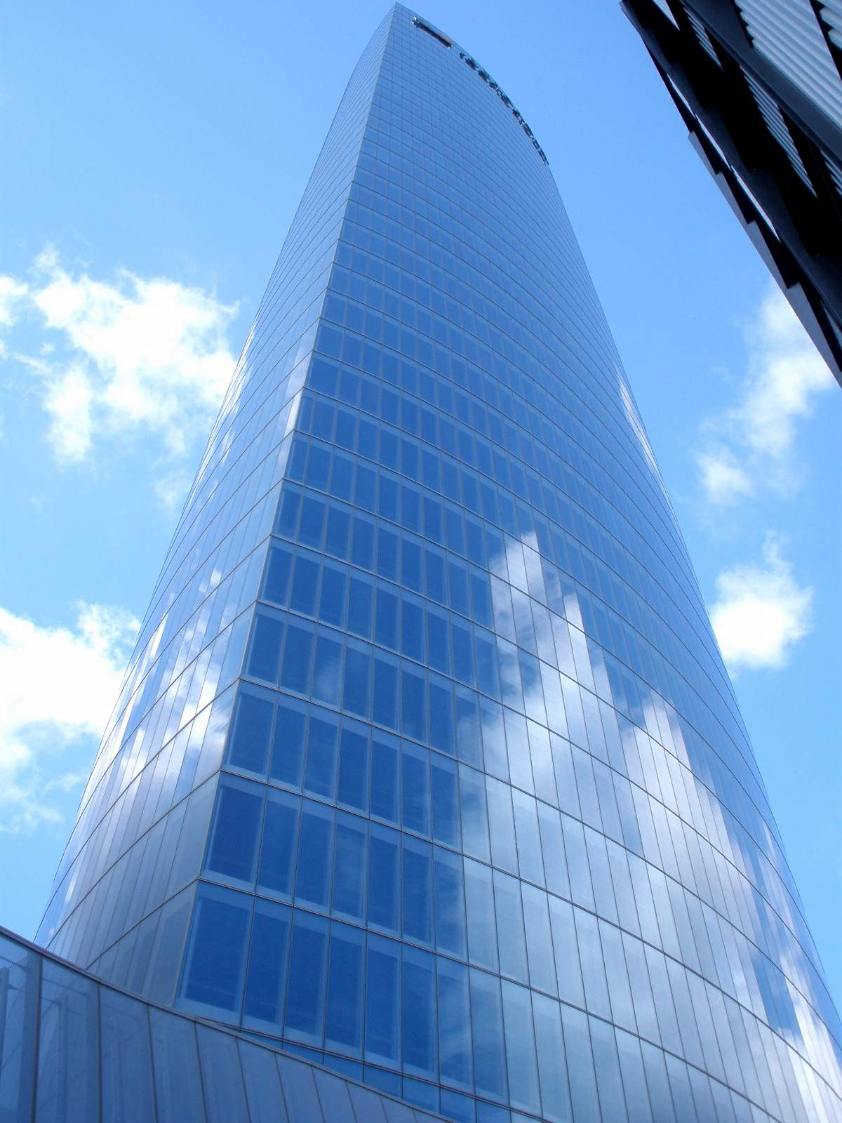 Iberdrola Tower, Bilbao